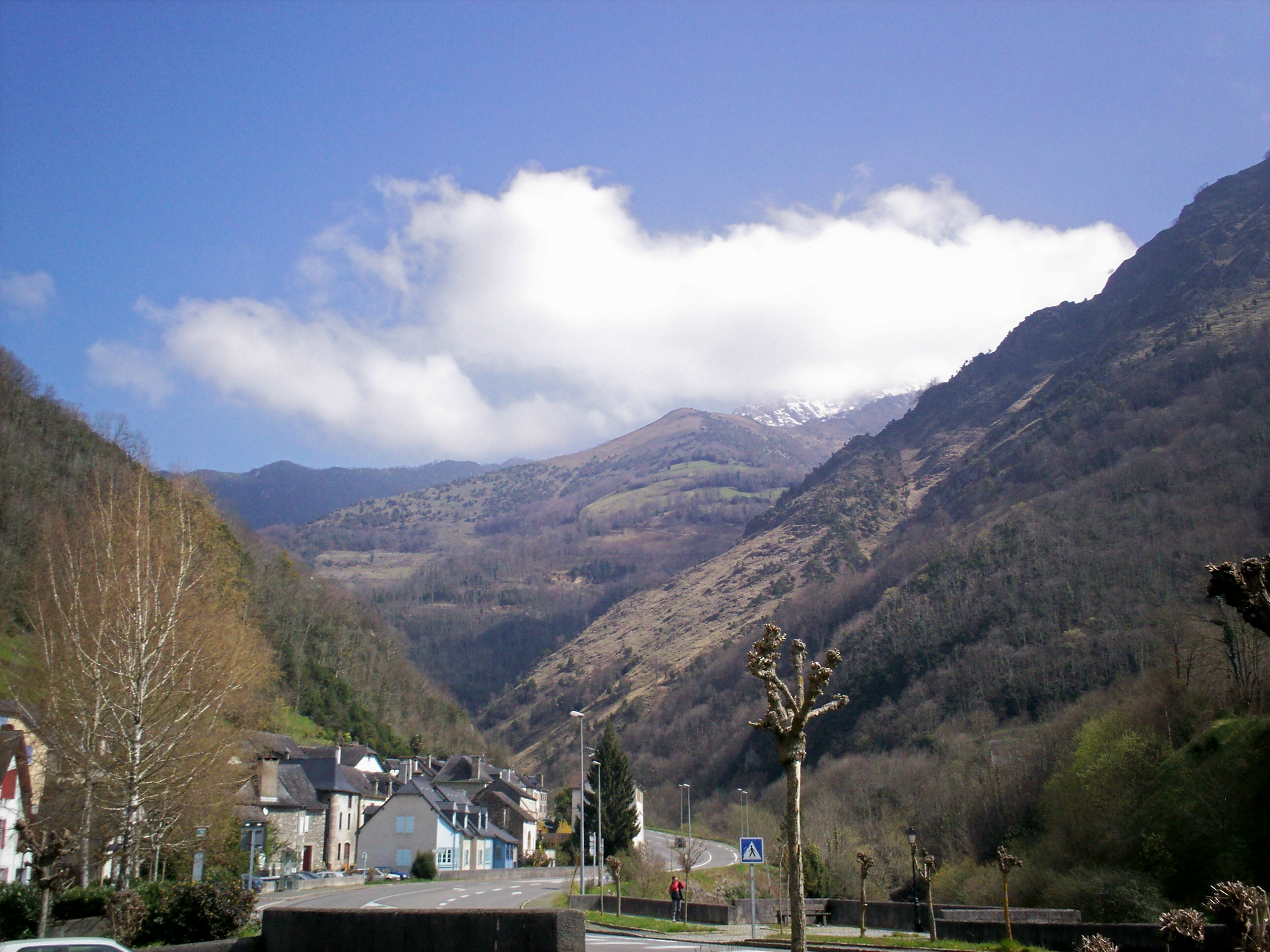 Sarrança dens la vath d'Aspa